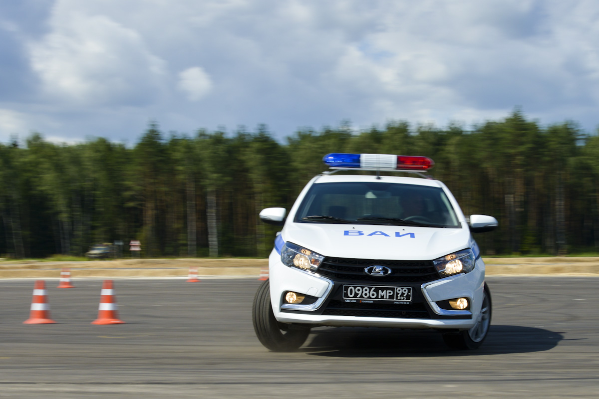 Торжественная церемония открытия международного конкурса «Дорожный патруль» (г. Ногинск)